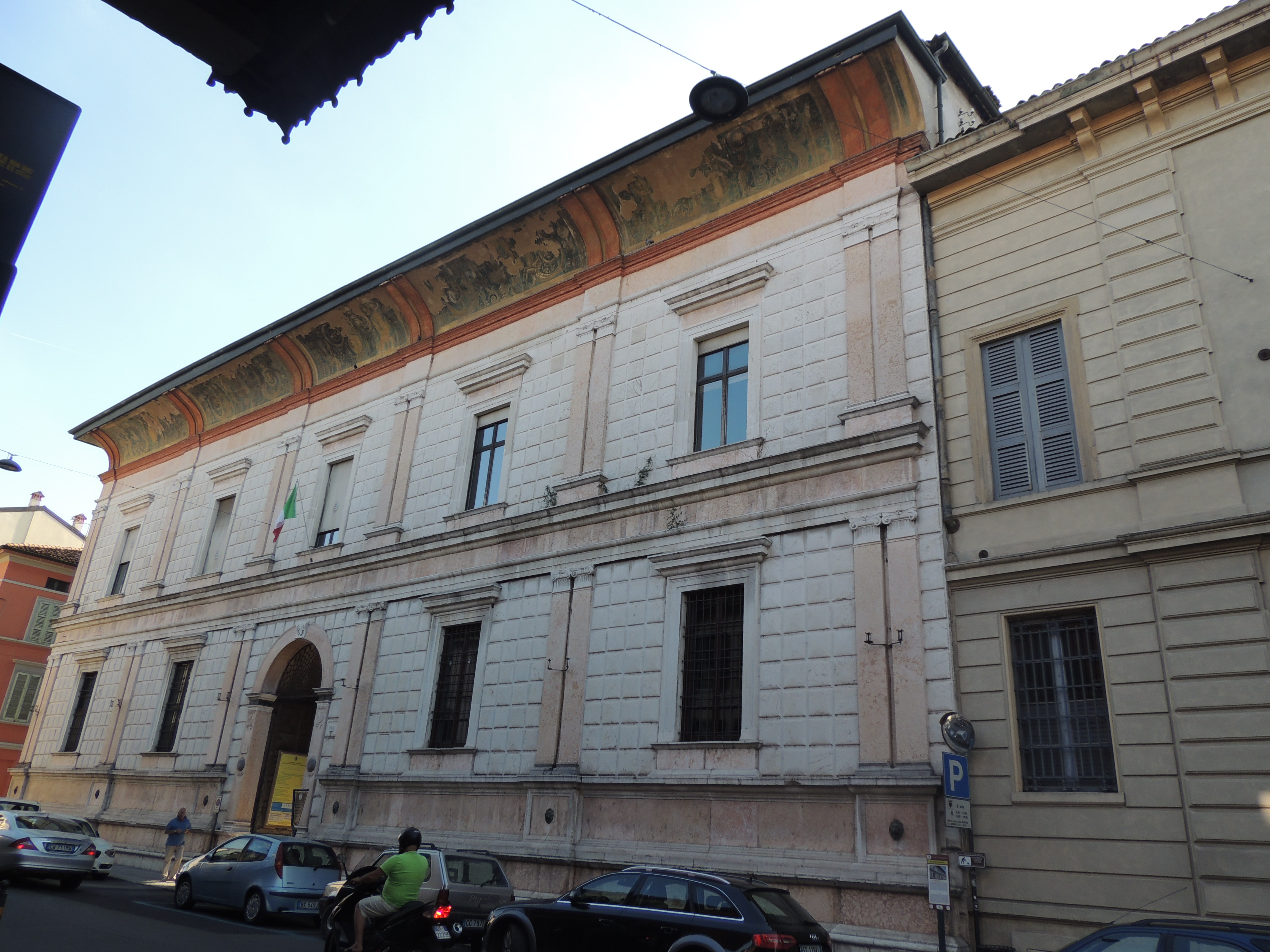 Palazzo Raimondi This is a photo of a monument which is part of cultural heritage of Italy.